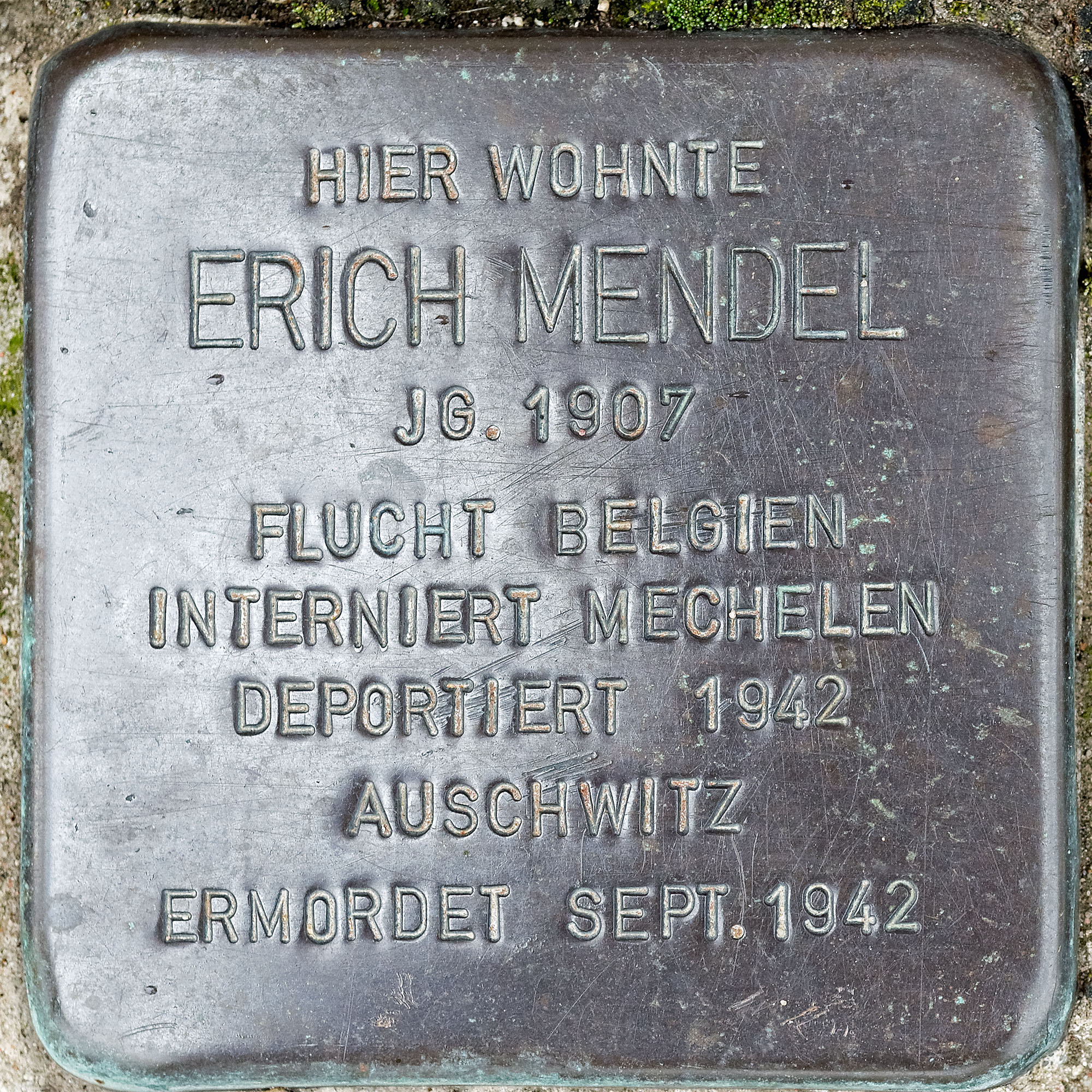 2017 07 16 Stolpersteine Kerken Mendel Erich